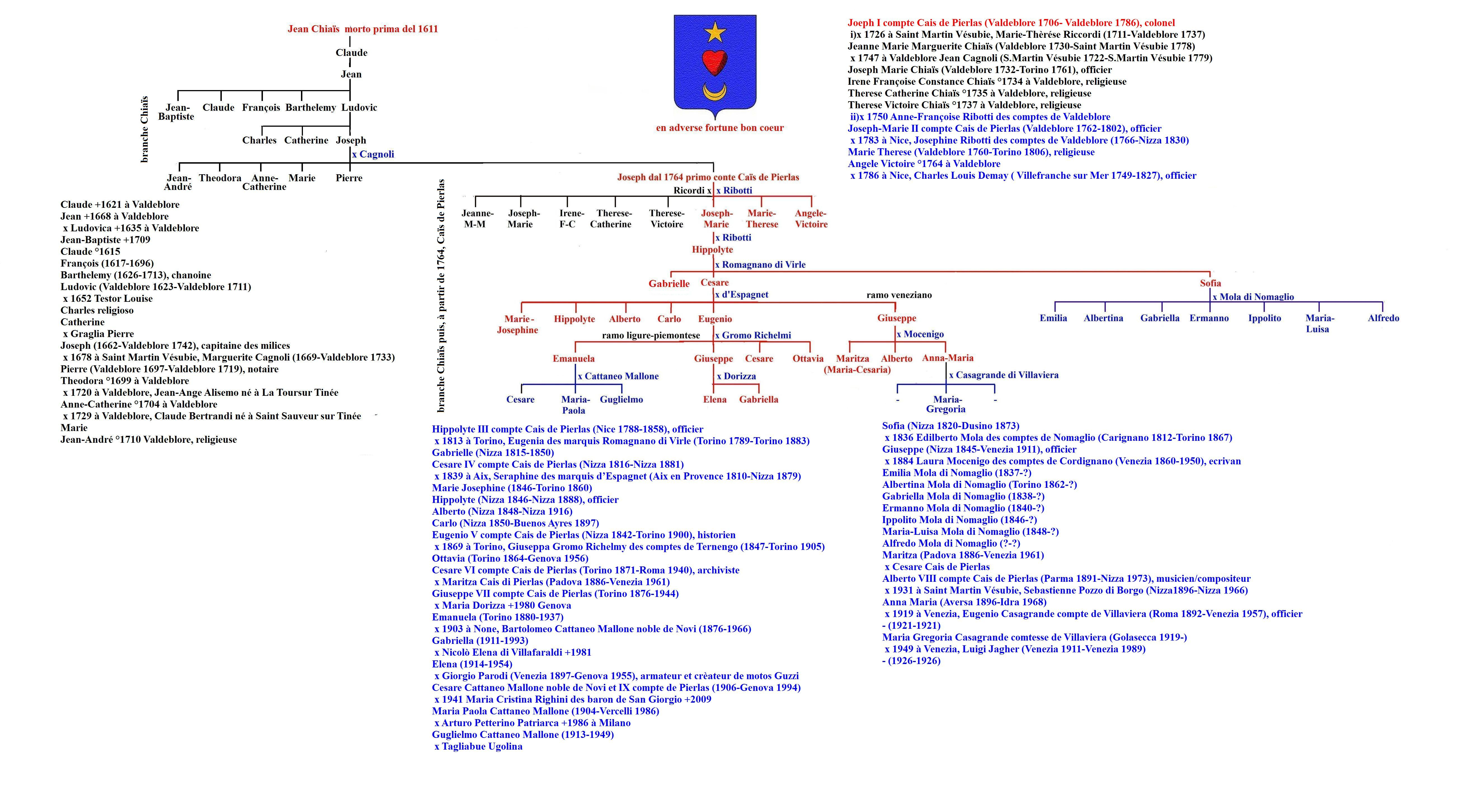 Arbre généalogique des Cais de Pierlas